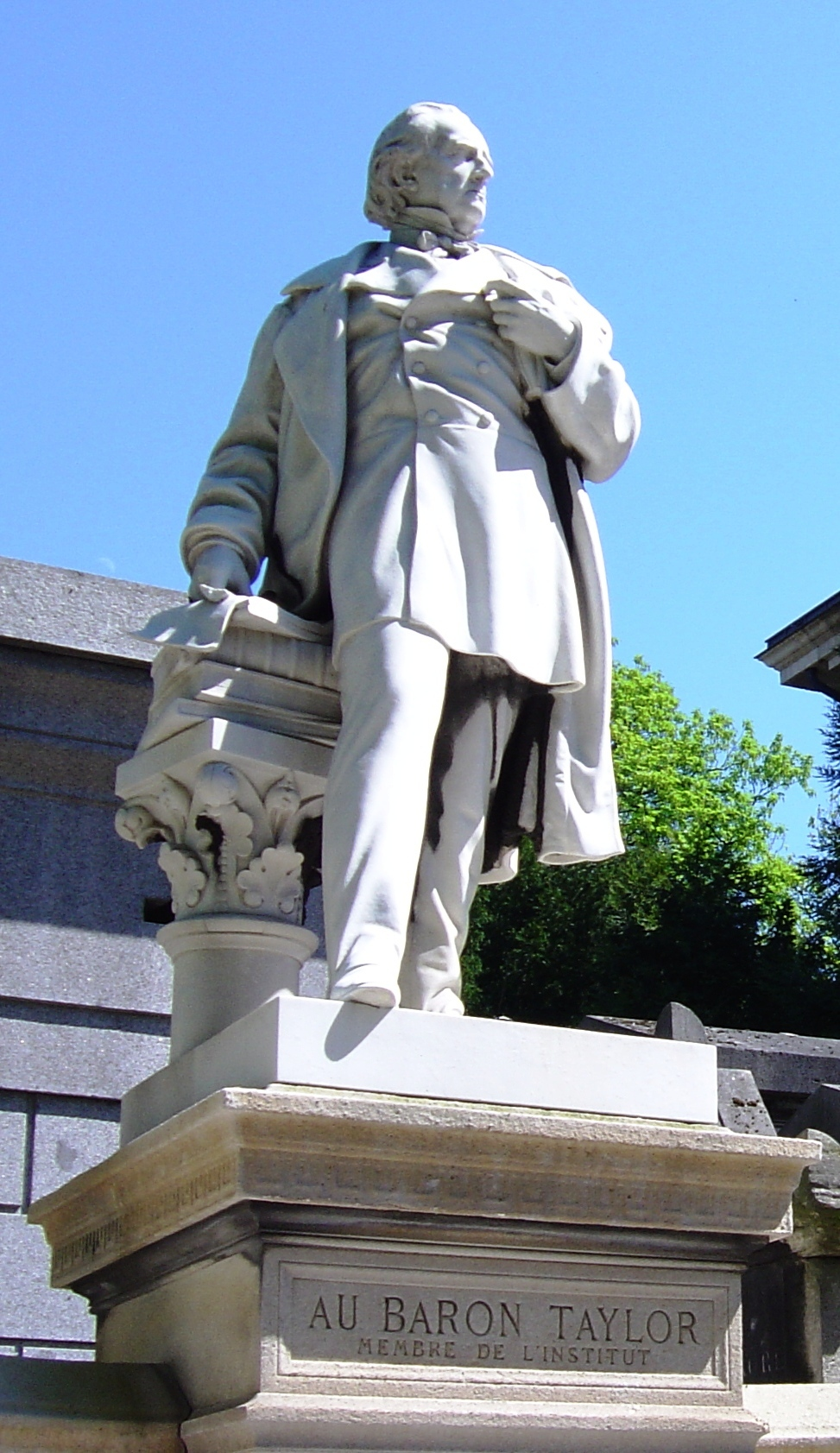 Statue du baron Taylor (1789-1879) au cimetière du Père Lachaise